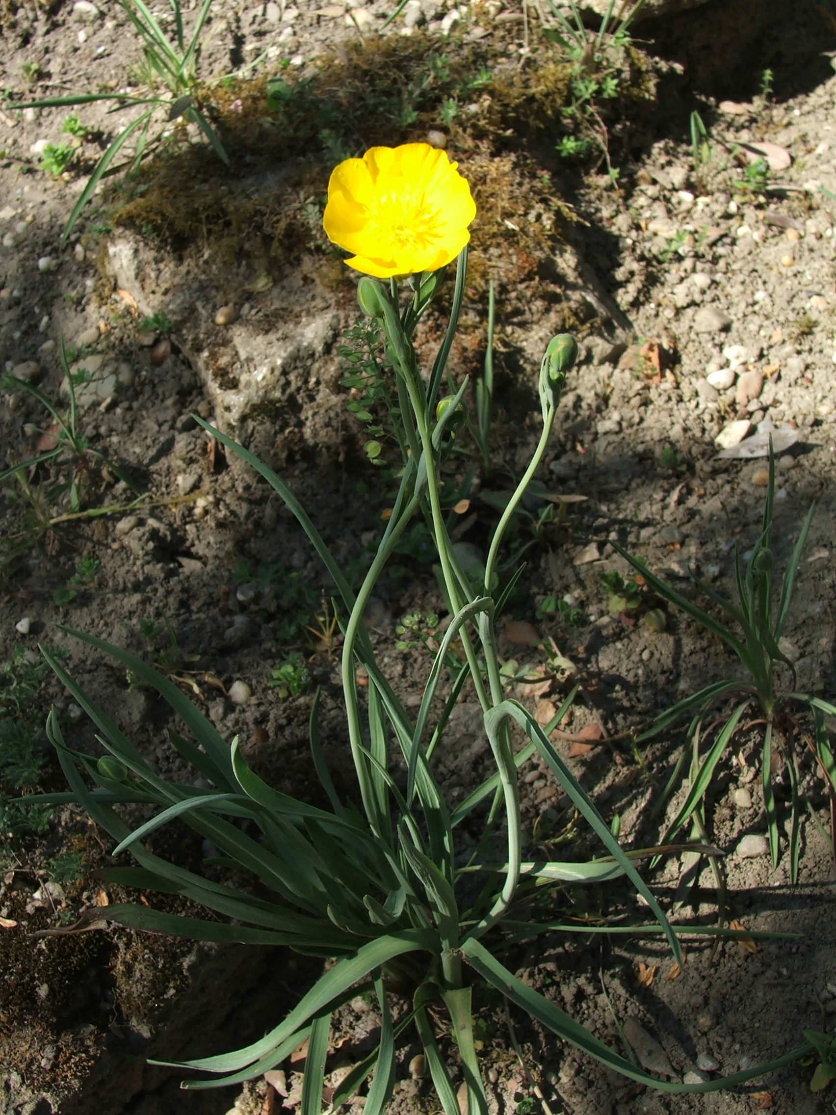 Ranunculus gramineus var. phoenicifolius. MTA Botanic Garden Vácrátót, Hungary.